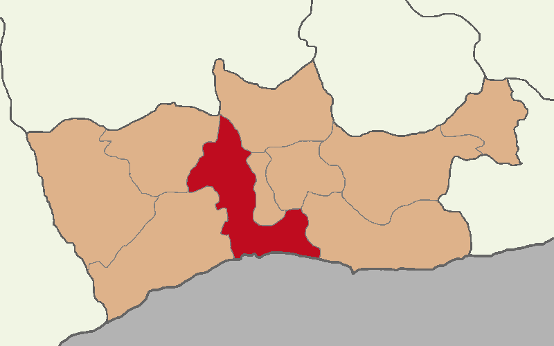 Artuklu ilçesinin konumu